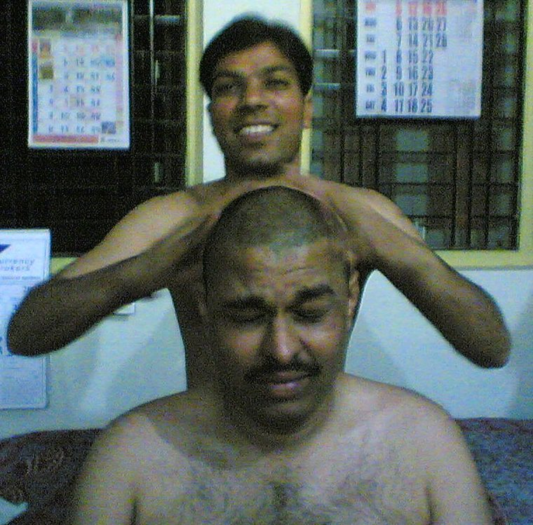 "Champie" (Indian Head Massage) in Mumbai, Maharashtra, India.